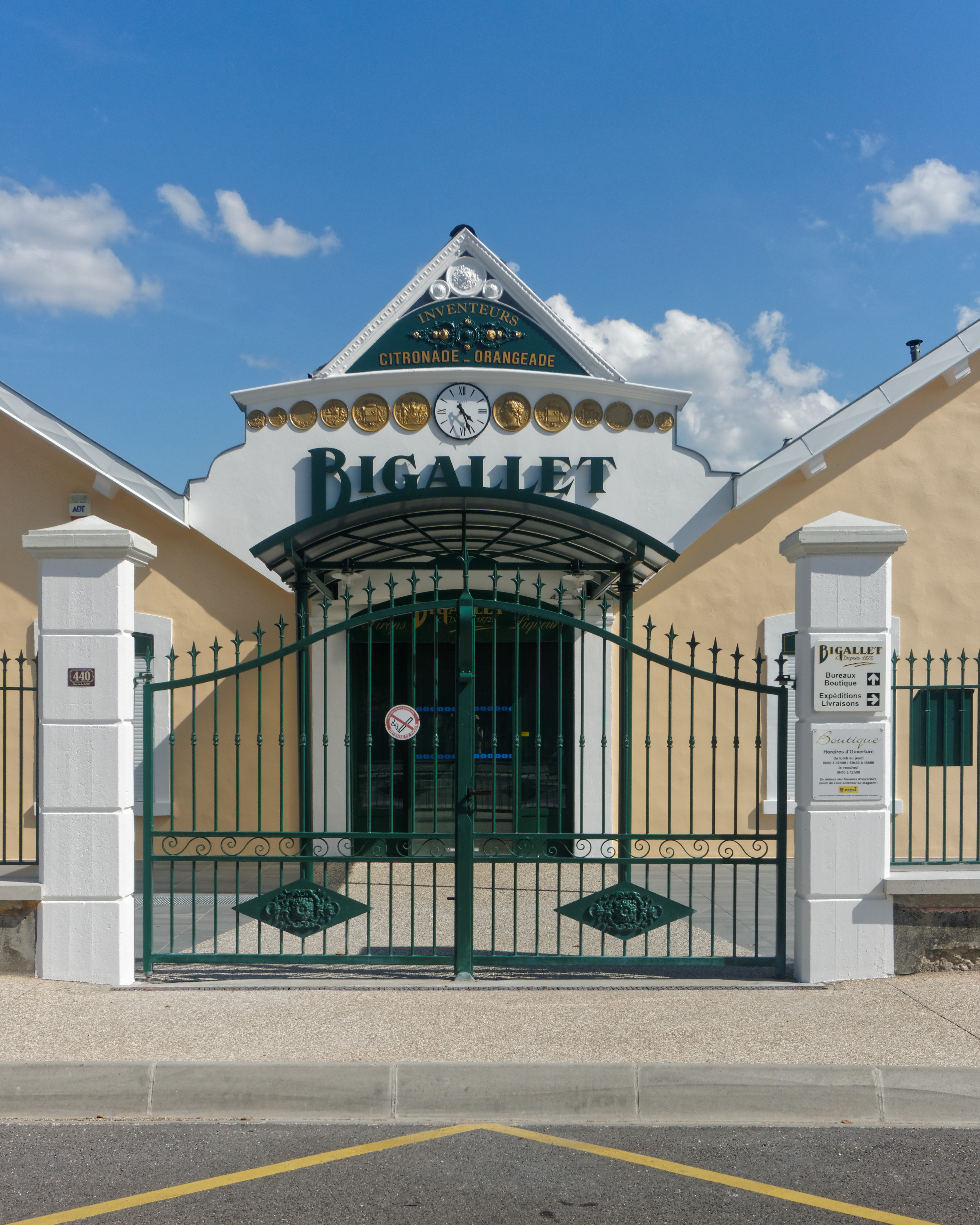 Entrée de l'usine Bigallet à Virieu